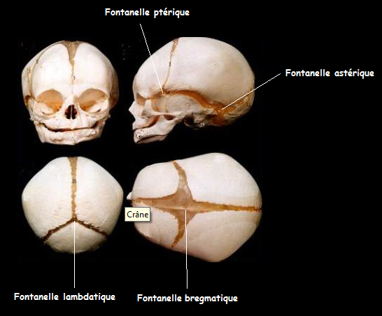 Crâne humain et ses quatre fontanelles sous différentes vues